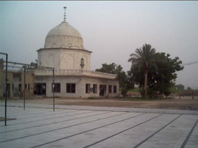 Shrine at Karmanawala Sharif, Okara, Pakistan